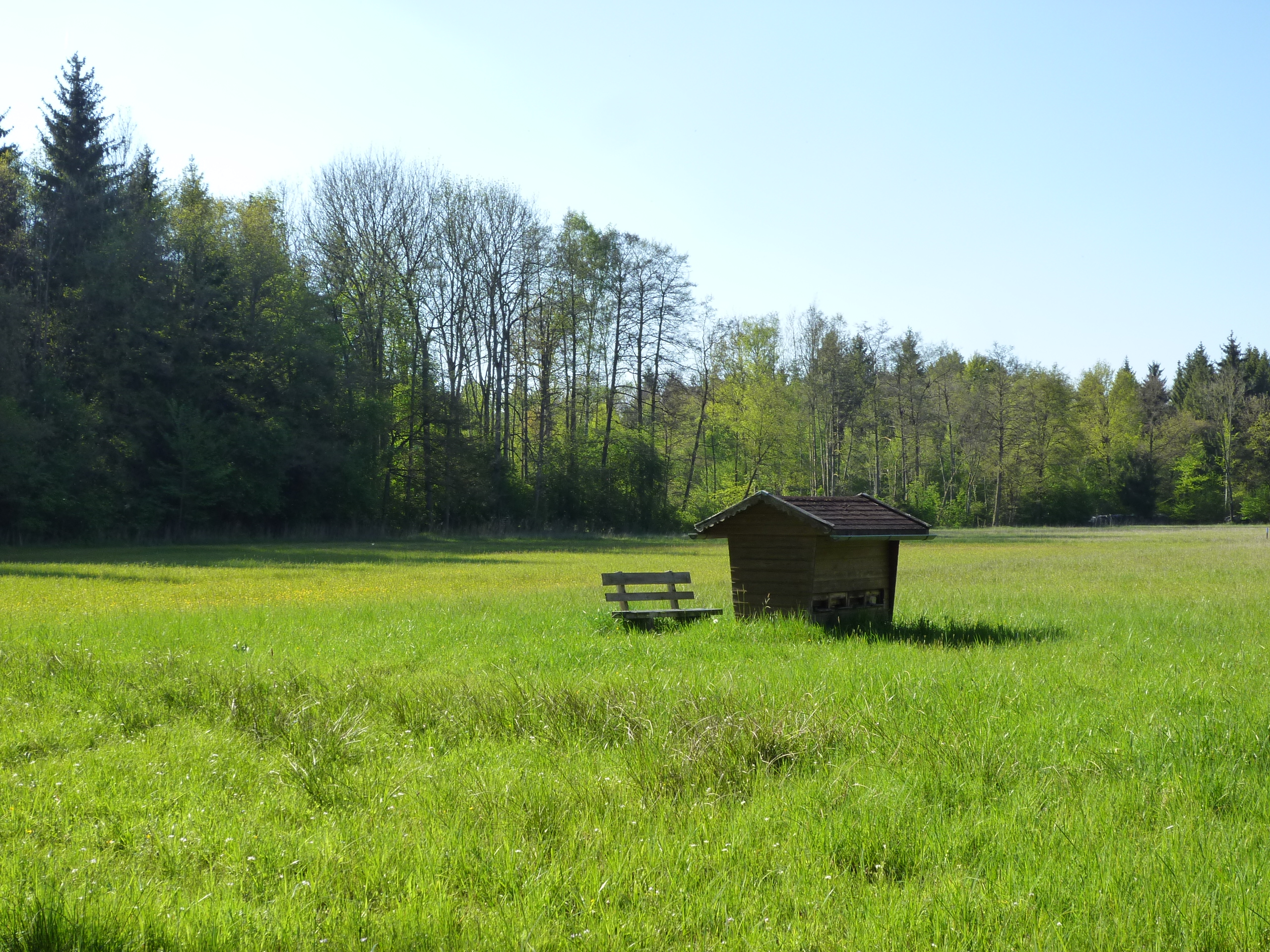 Blick über eine feuchte Waldwiese bei Rain im Landkreis Straubing-Bogen. Das Gebiet gehört zum EU-Vogelschutzgebeit "Wälder im Donautal". Der Landesbund für Vogelschutz hat in diesem Bereich einen Lehrpfad mit Info-Tafeln eingerichtet. Das Gebiet erstreckt sich aber auch in den Landkreis Regensburg hinein.